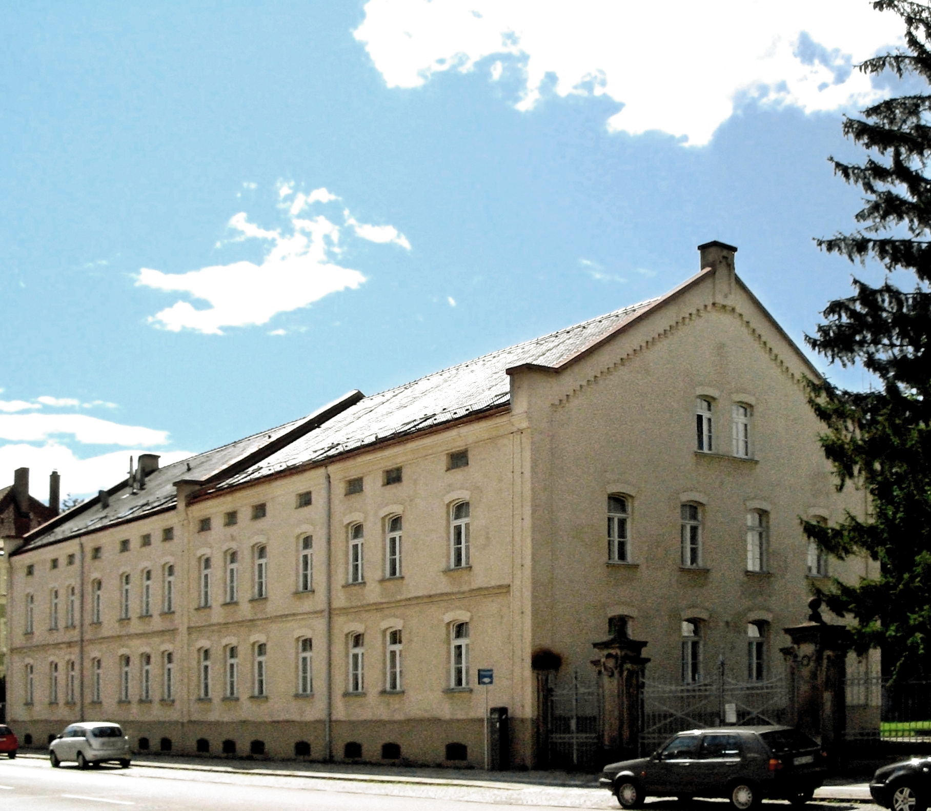 Barackenkasernement Oberwiesenfeld in München: Gebäude der Pionierabteilung